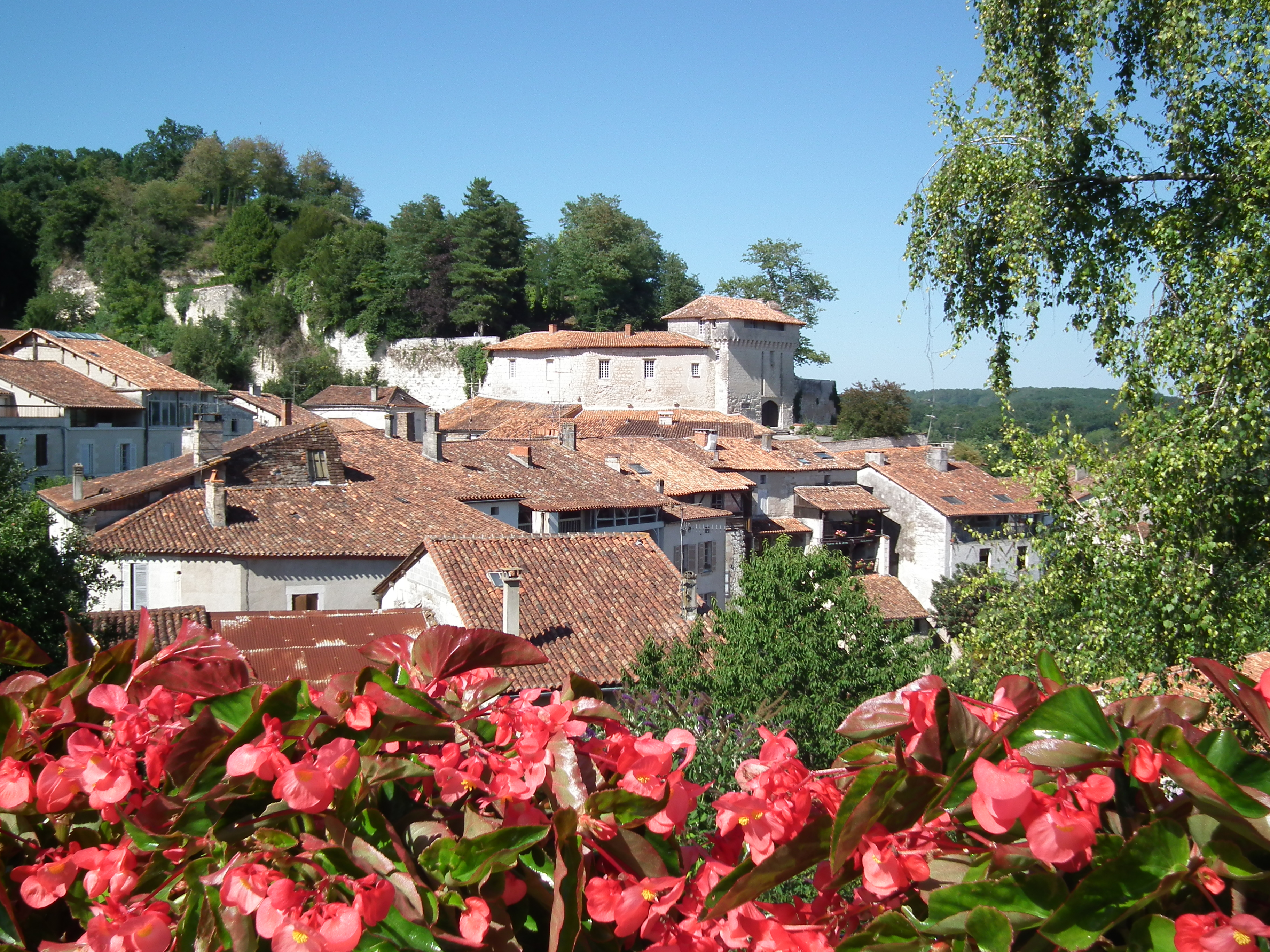 Vue du village d'Aubeterre-sur-Dronne.